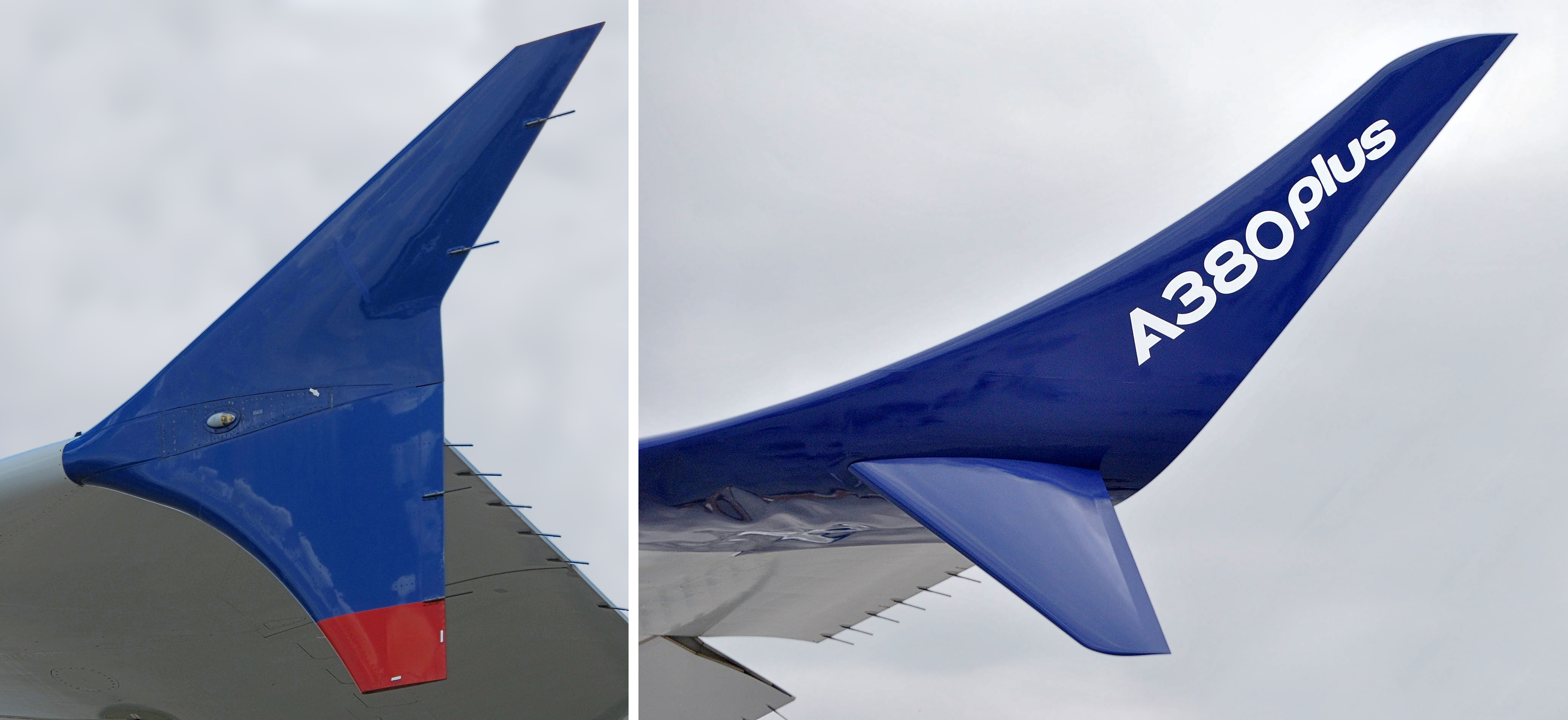 Wingletvergleich eines Airbus A380 und A380plus